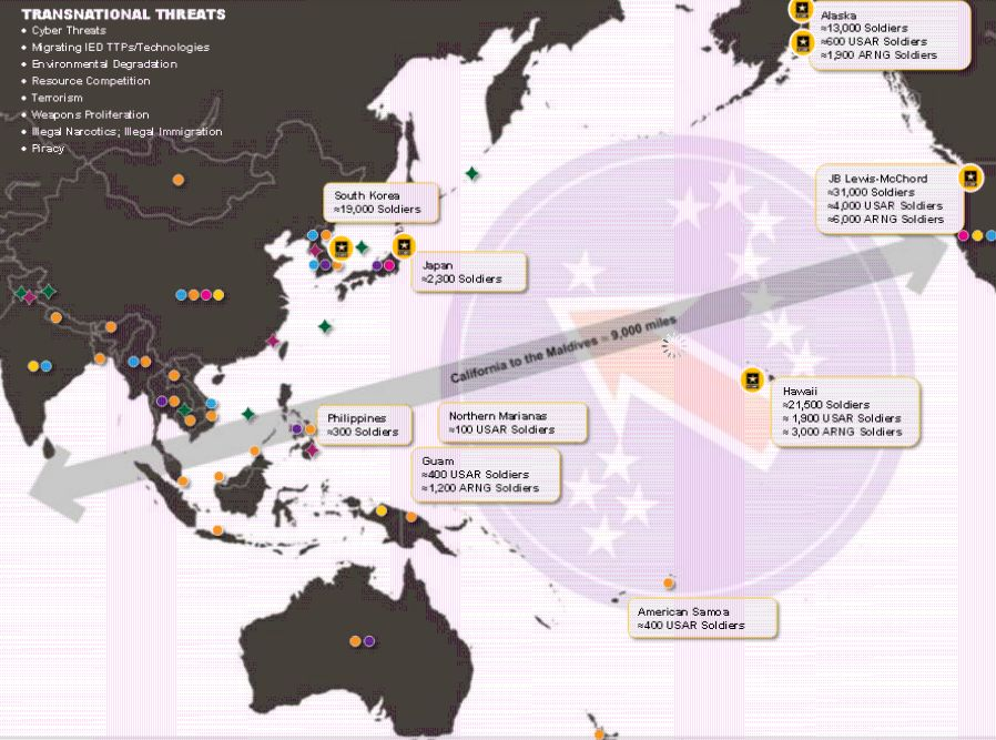 Schematische Darstellung des Einsatzgebietes der United States Army Pacific (2014)